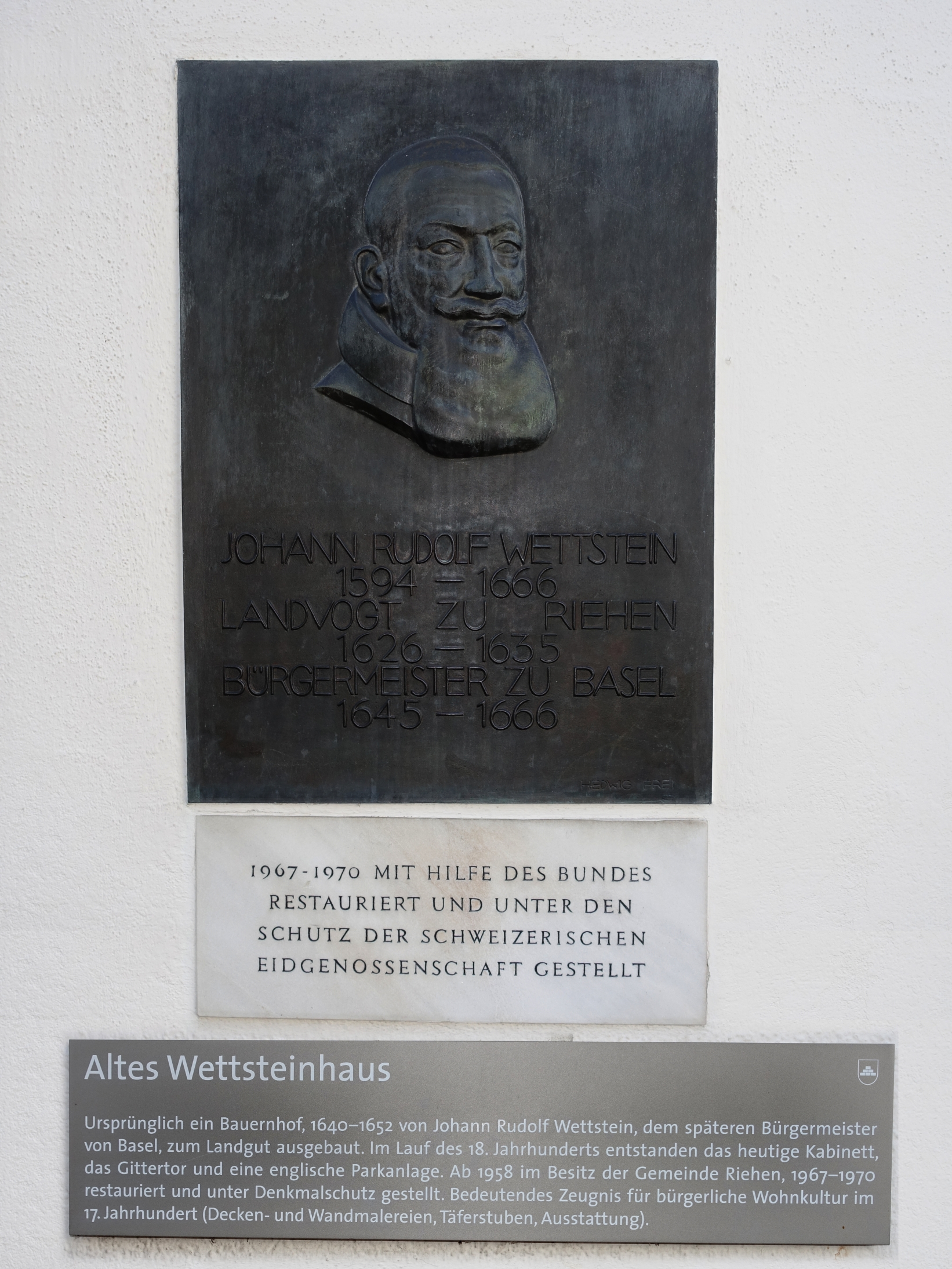 Gedenktafel (1948) zu Ehren J. R. Wettstein (1594–1666) am Wettsteinhaus in Riehen von Hedwig Frei (1905–1958), Bildhauerin